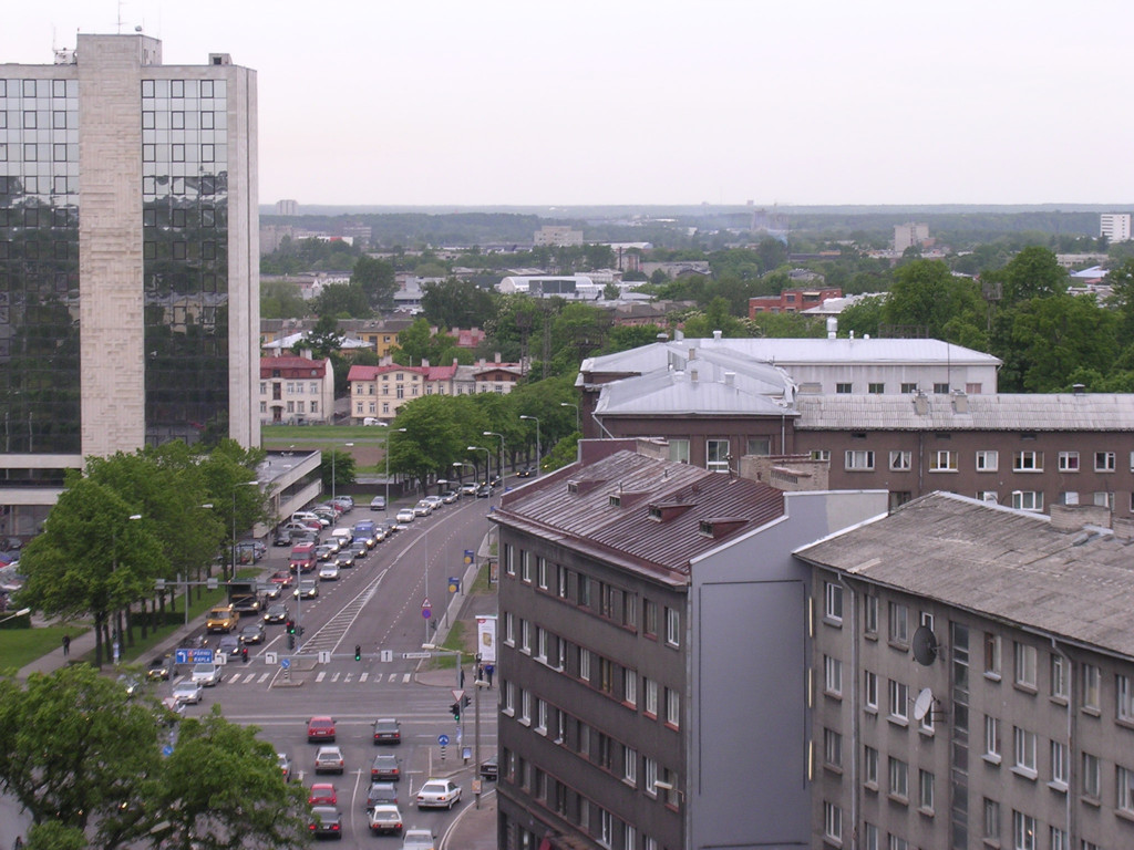 Suur-Ameerika, view from Hansabank